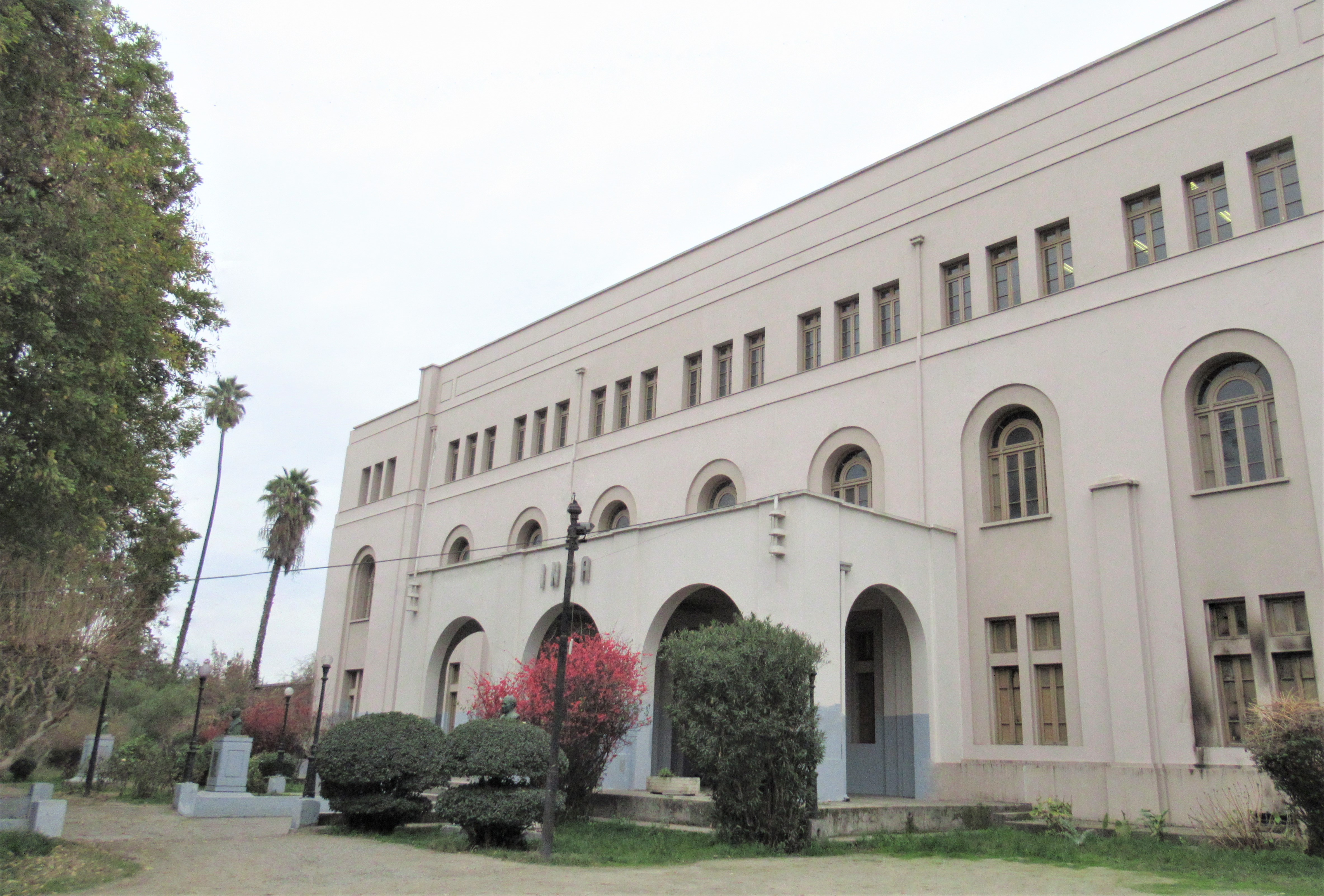 Frontis y jardines del INBA en 2019.